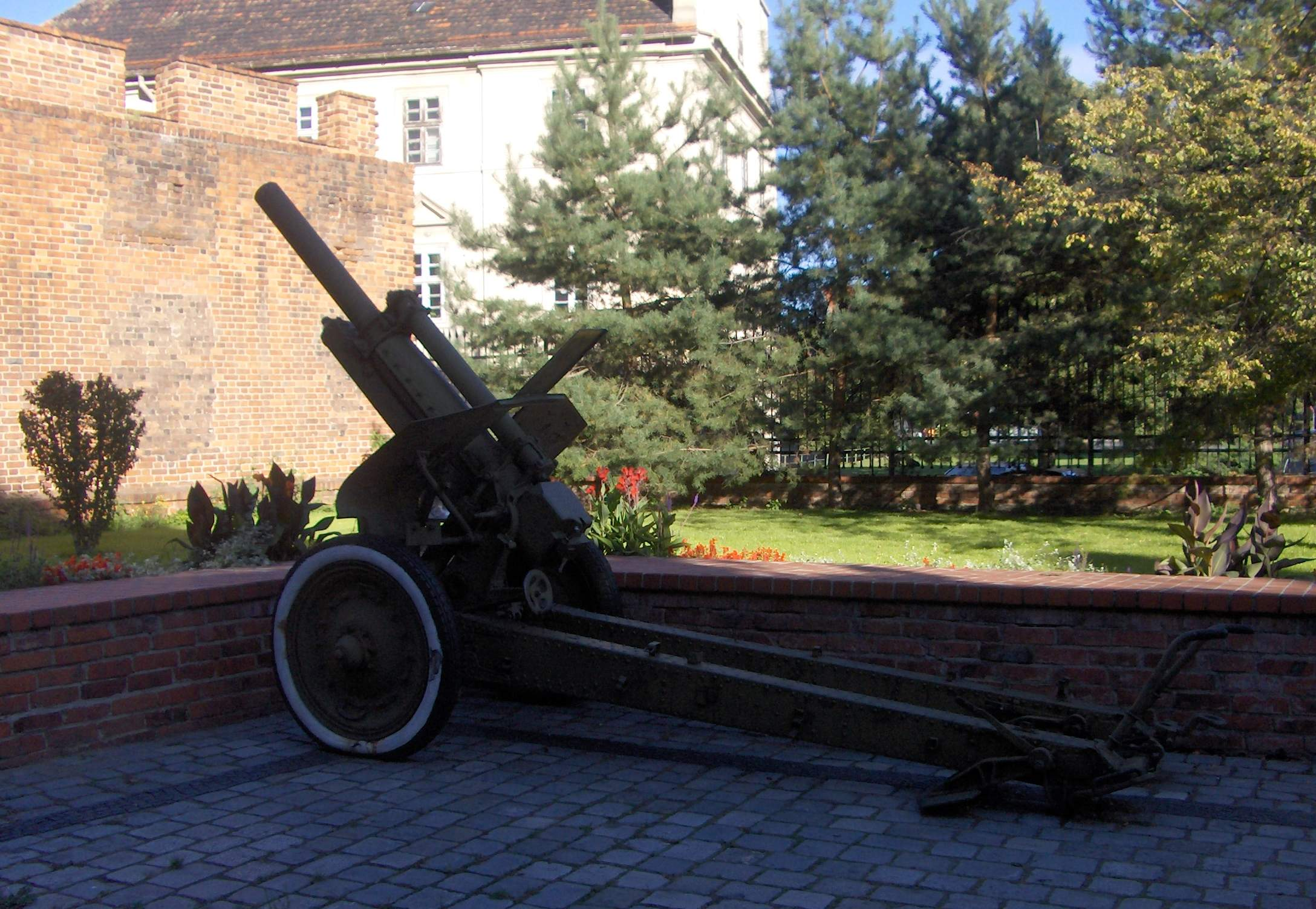 Działo na placu przed Arsenałem Miejskim we Wrocławiu